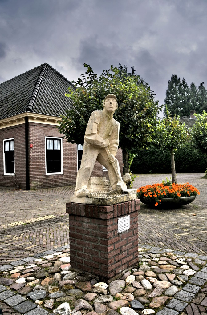 De plaggensteker (1982) by Francesca Zijlstra, Dorpshuis in Hoenderloo/The Netherlands. Heideplag speelde in Hoenderloo een grote rol, zowel voor huisvesting van mensen als voor voeding voor dieren. Onthuld op 8 mei 1982 door wethouder G.J. van de Graaf. In the old days sod was a very important element in the lives of the people and animals of Hoenderloo. They used it respectively for accommodation and food.